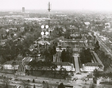 Gen Lucius D. Clay Headquarters Berlin-Dahlem Anfang der 1980er Jahre